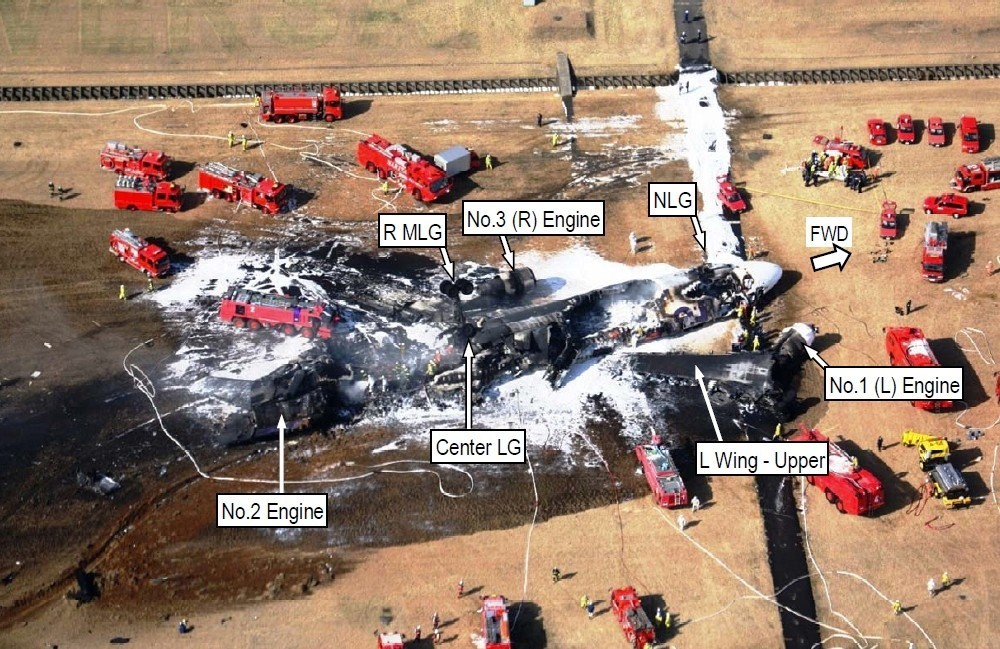 航空事故調査報告書AA2013-4-2より、フェデックス80便の事故現場